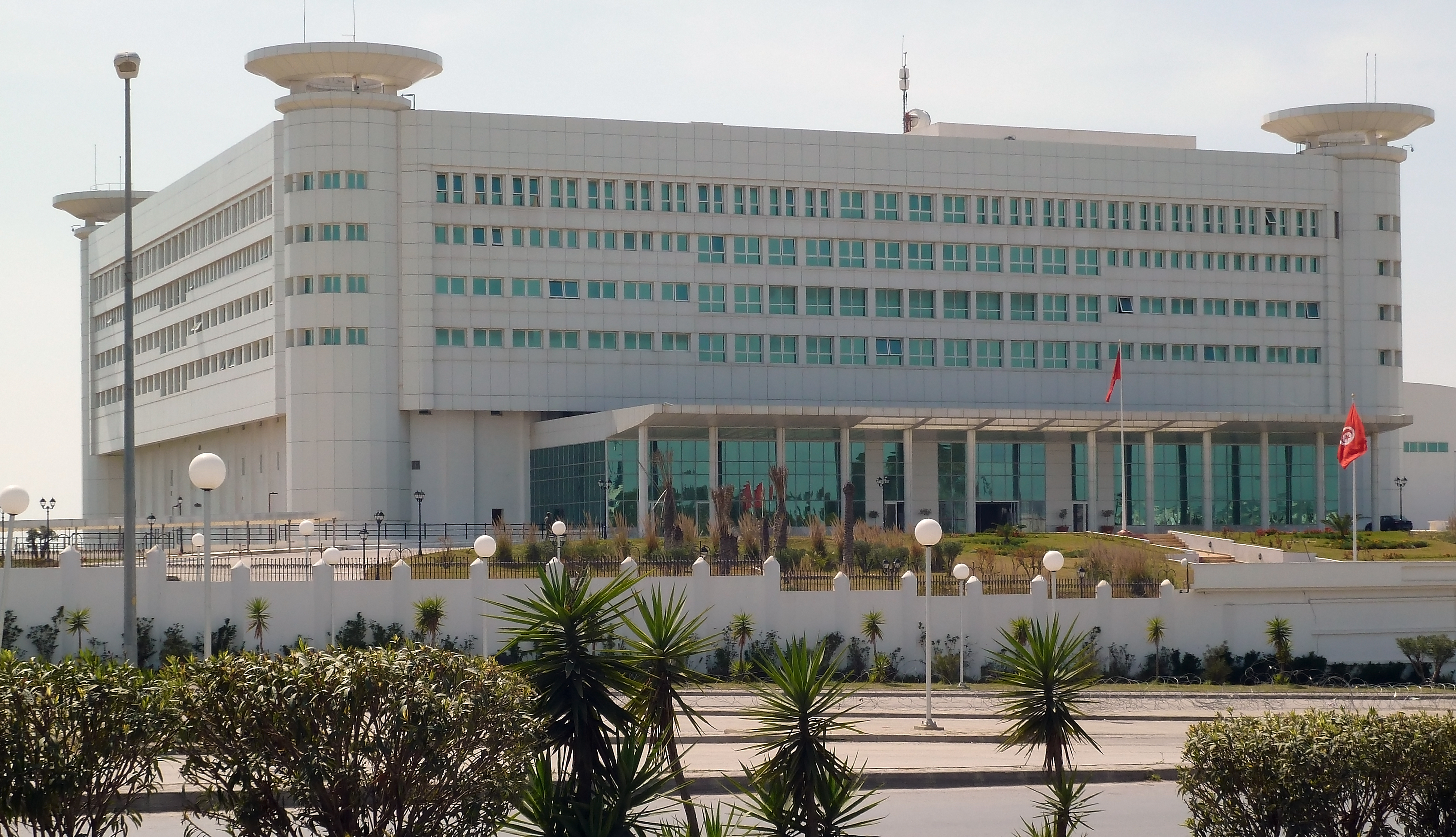 Bâtiment de la télévision nationale tunisienne à Tunis